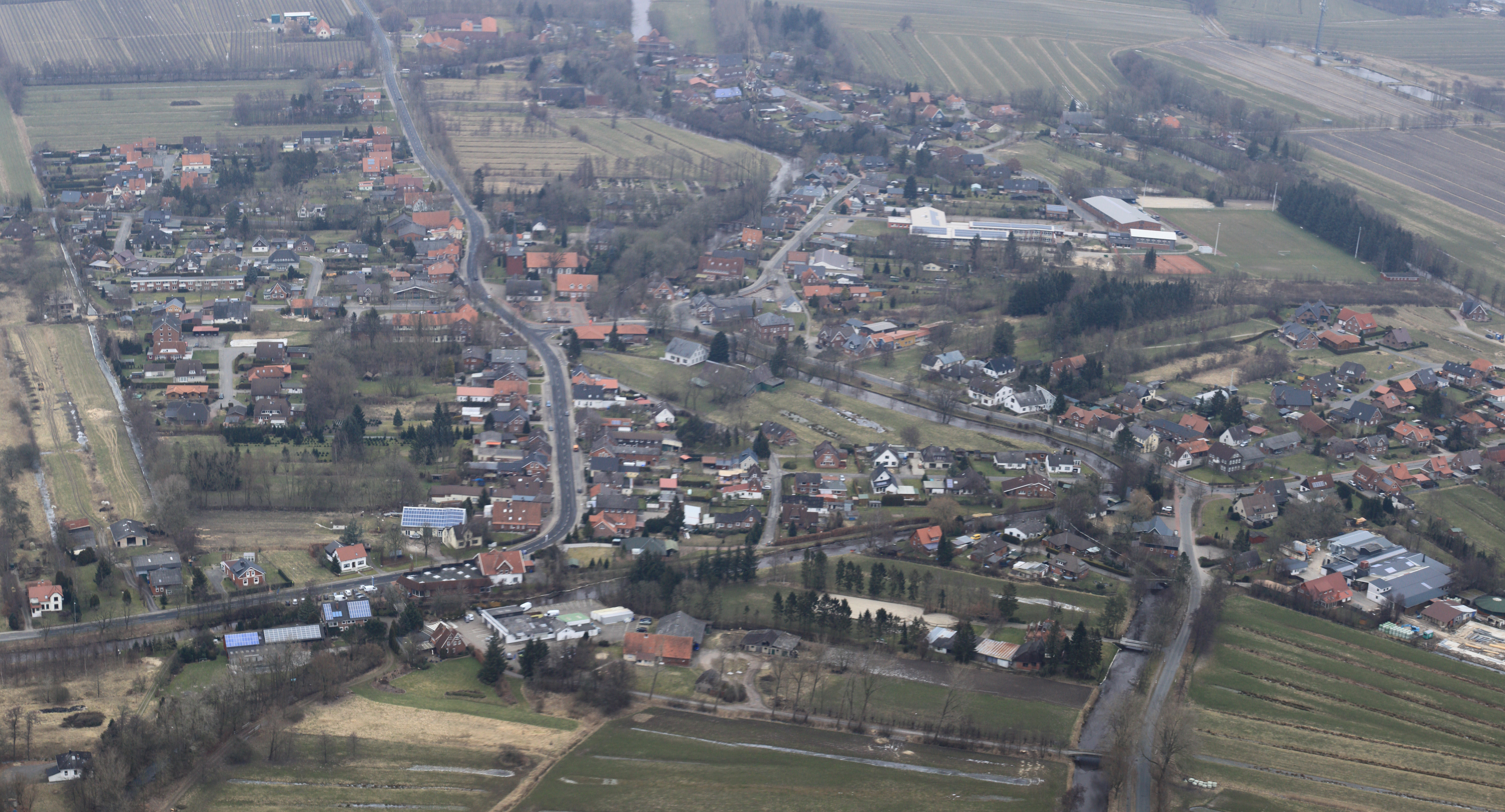 Luftaufnahme: Ihlienworth